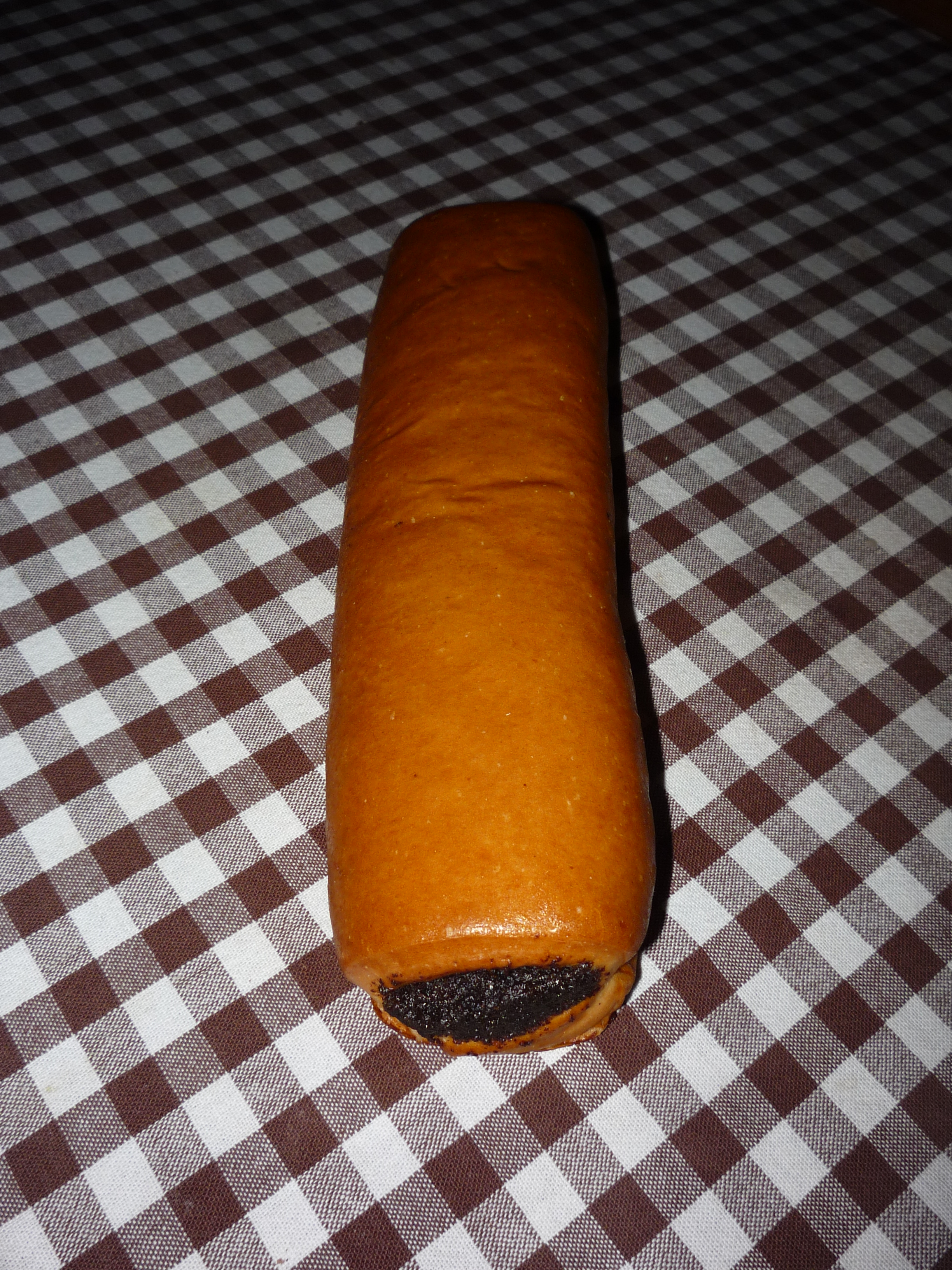 Autor fotografie Jiří Zelenka. Makový závin. Sladké pečivo vhodné na snídaní. Tradiční pečivo ČSSR. Czech Republic.